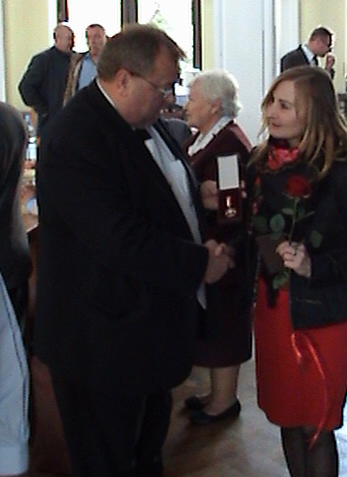 Wręczenie medalu